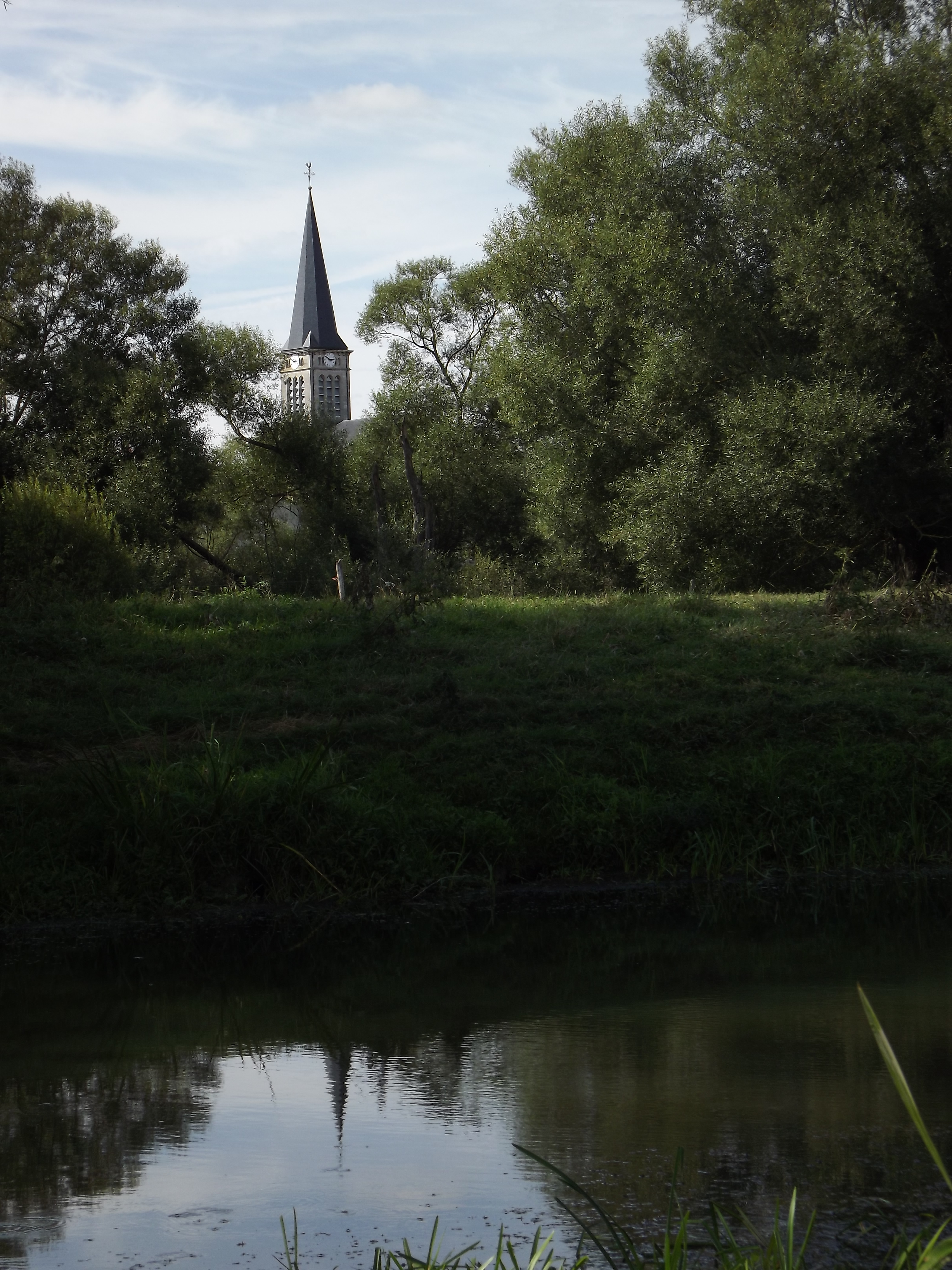 vue de la Meuse